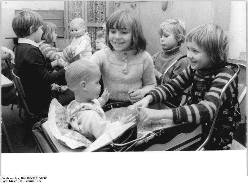 Spreenhagen, Kinder im Spiel ADN-ZB Müller 16.2.77 Bez. Frankfurt-Oder: DDR aktuell-ADN-Reporter erleben einen Tag in Gemeindeverbänden-Fröhliches und lustiges Treiben herrscht in den Winterferien in den Schulen von Spreenhagen. Auf dem Ferienprogramm stehen viele schöne Veranstaltungen für die Kinder wie zum Beispiel eine zukünftige Faschingsfeier, ein Pioniermanöver und eine Fahrt nach Berlin zum Palast der Republik. Die zwei zentralen Schulen des Gemeindeverbandes Spreenhagen, Kreis Fürstenwalde, besuchen über 300 Kinder aus den fünf Gemeinden des Verbandes. (Beachten Sie zur ADN-Serie "Gemeindeverbände" auch unsere Fotos S0216-2-4N!)